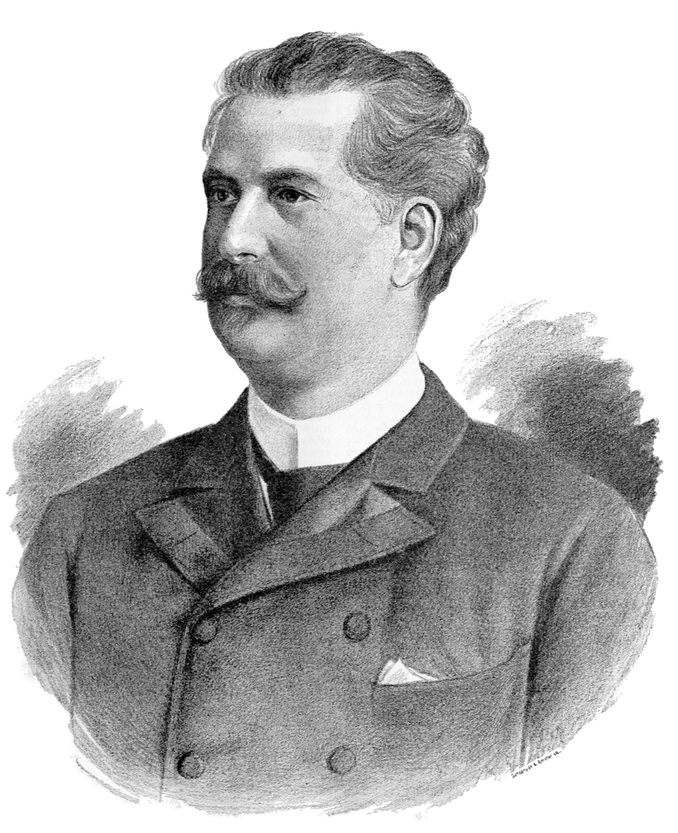 Gustav Ritter von Mauthner (1848–1902), Austrian banker